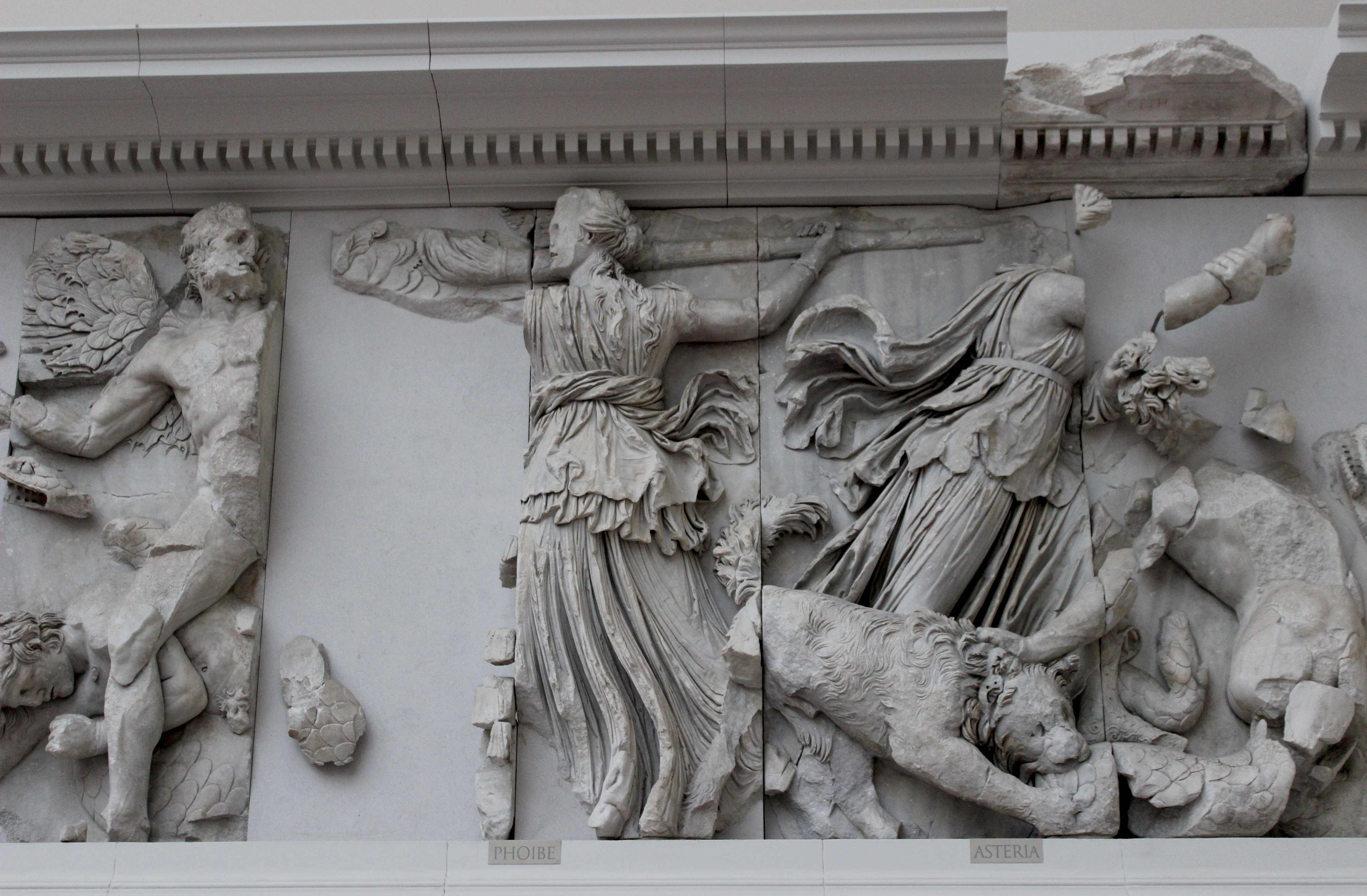 Asteria lucha con los gigantes. Altar de Pérgamo.